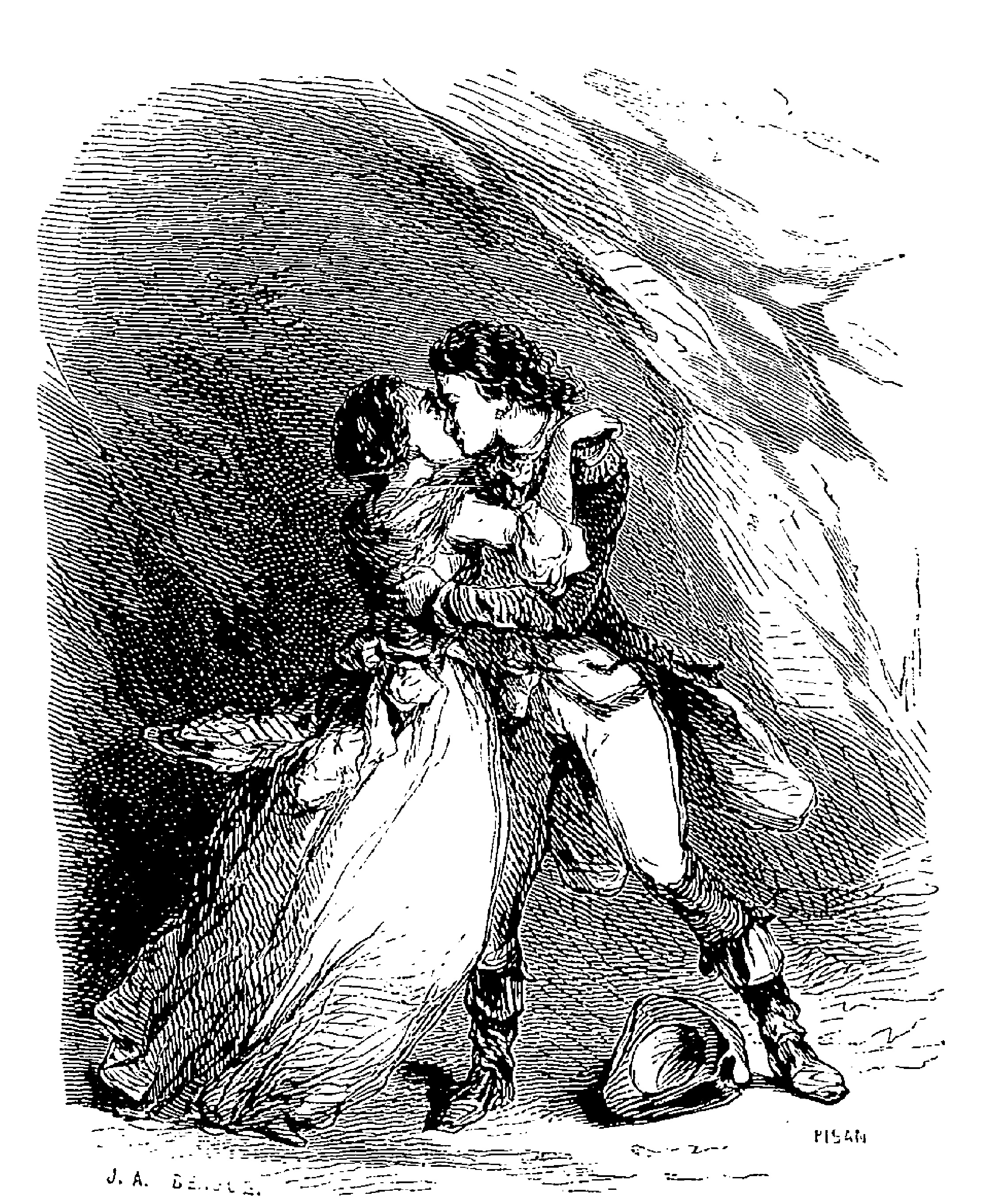 Illustrations for "Bug-Jargal" by Victor Hugo